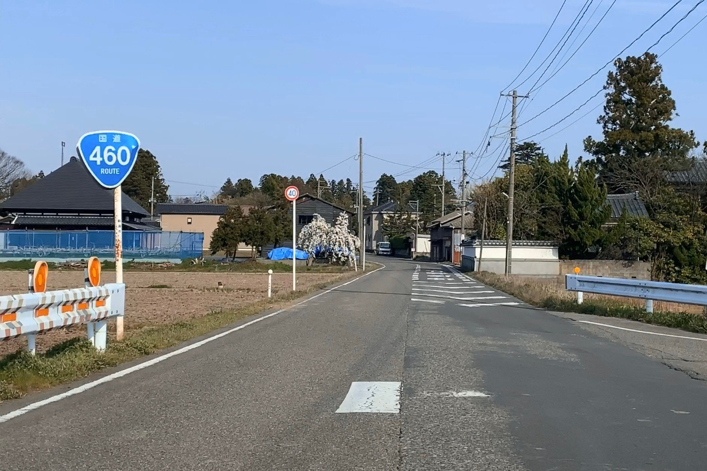 国道460号 新潟市西蒲区峰岡付近（2020年4月）